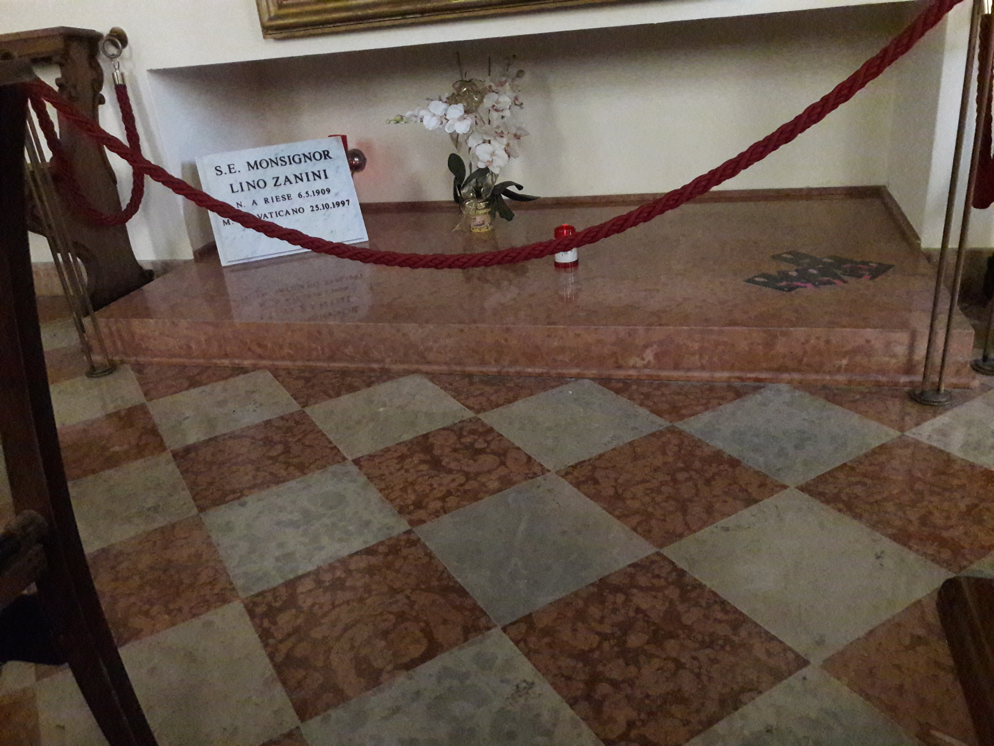 Riese Pio X, santuario della Beata Vergine delle Cendrole, interno: tomba dell'Arcivescovo Monsignor Lino Zanini.